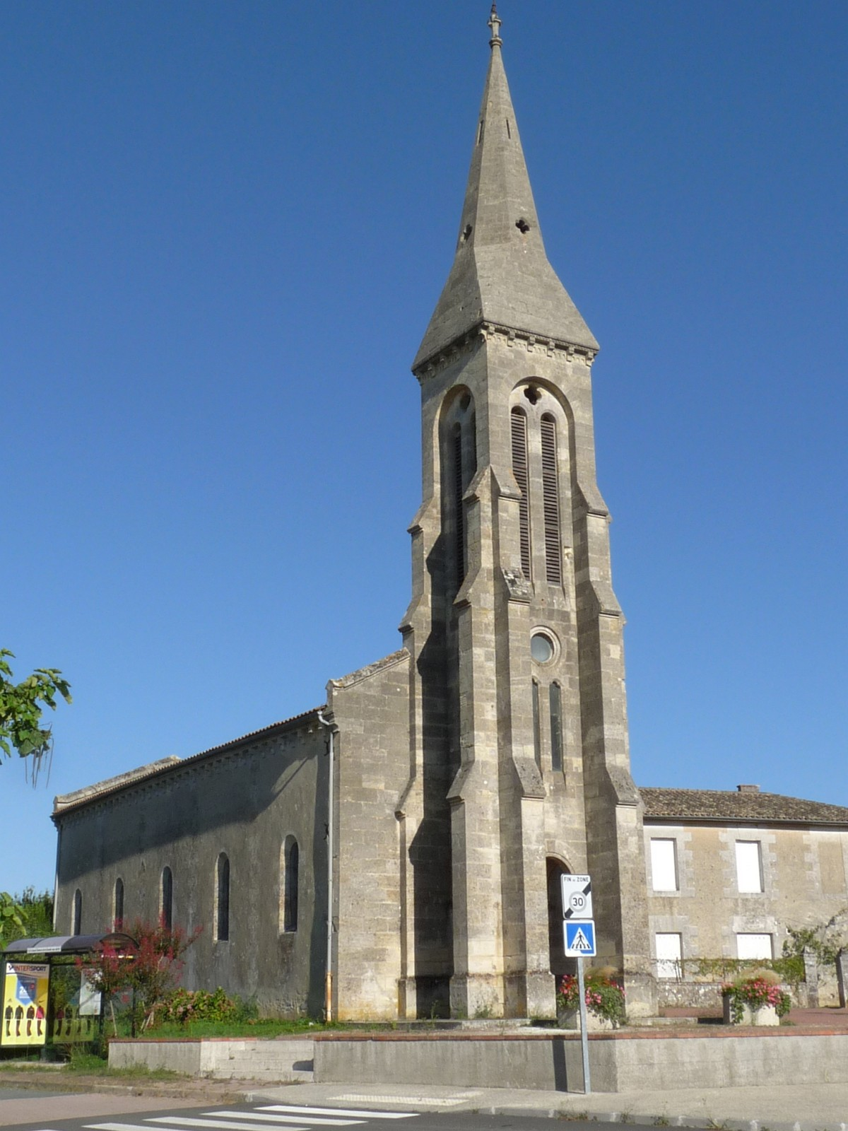 Eglise de St-Caprais-de-Blaye, Gironde, France